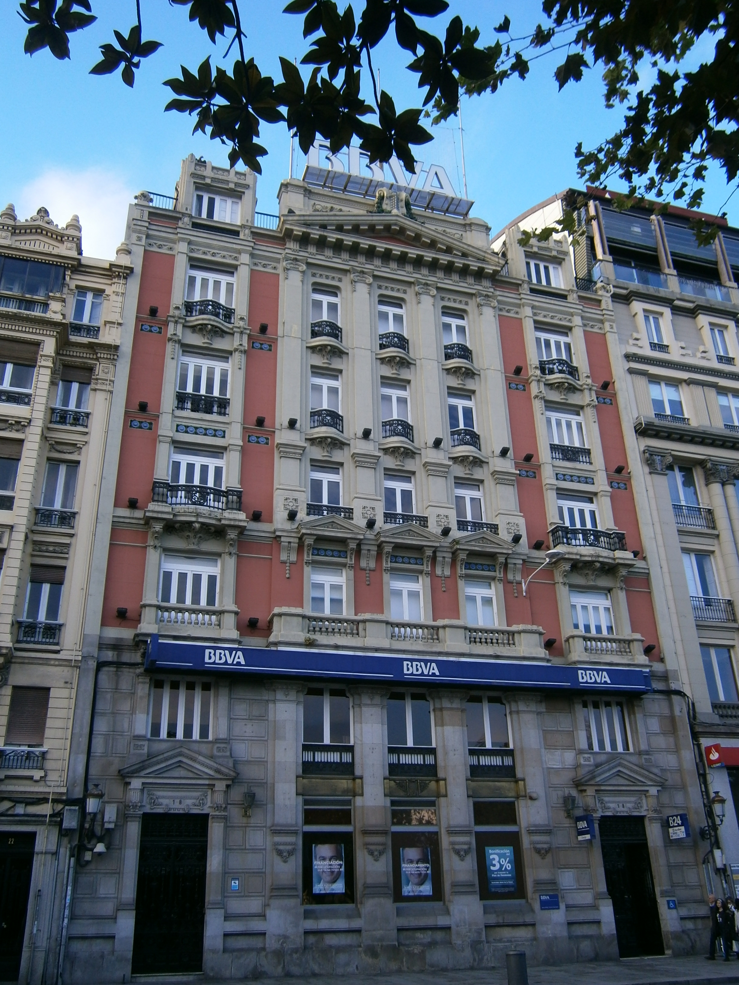 Antiga sede do Banco de La Coruña na Coruña, de Leoncio Bescansa